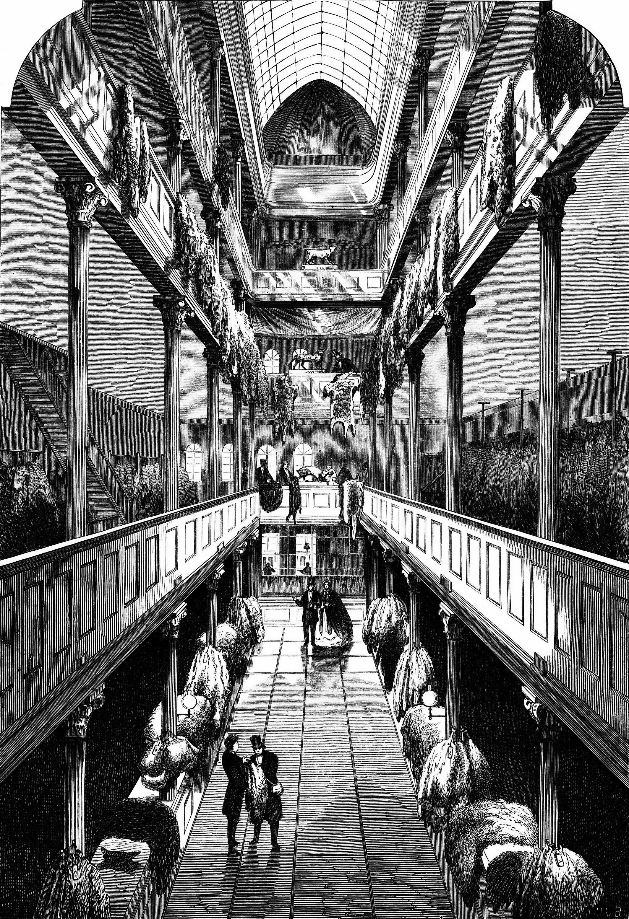 Pelzhandel von Heinrich Lomer in Leipzig